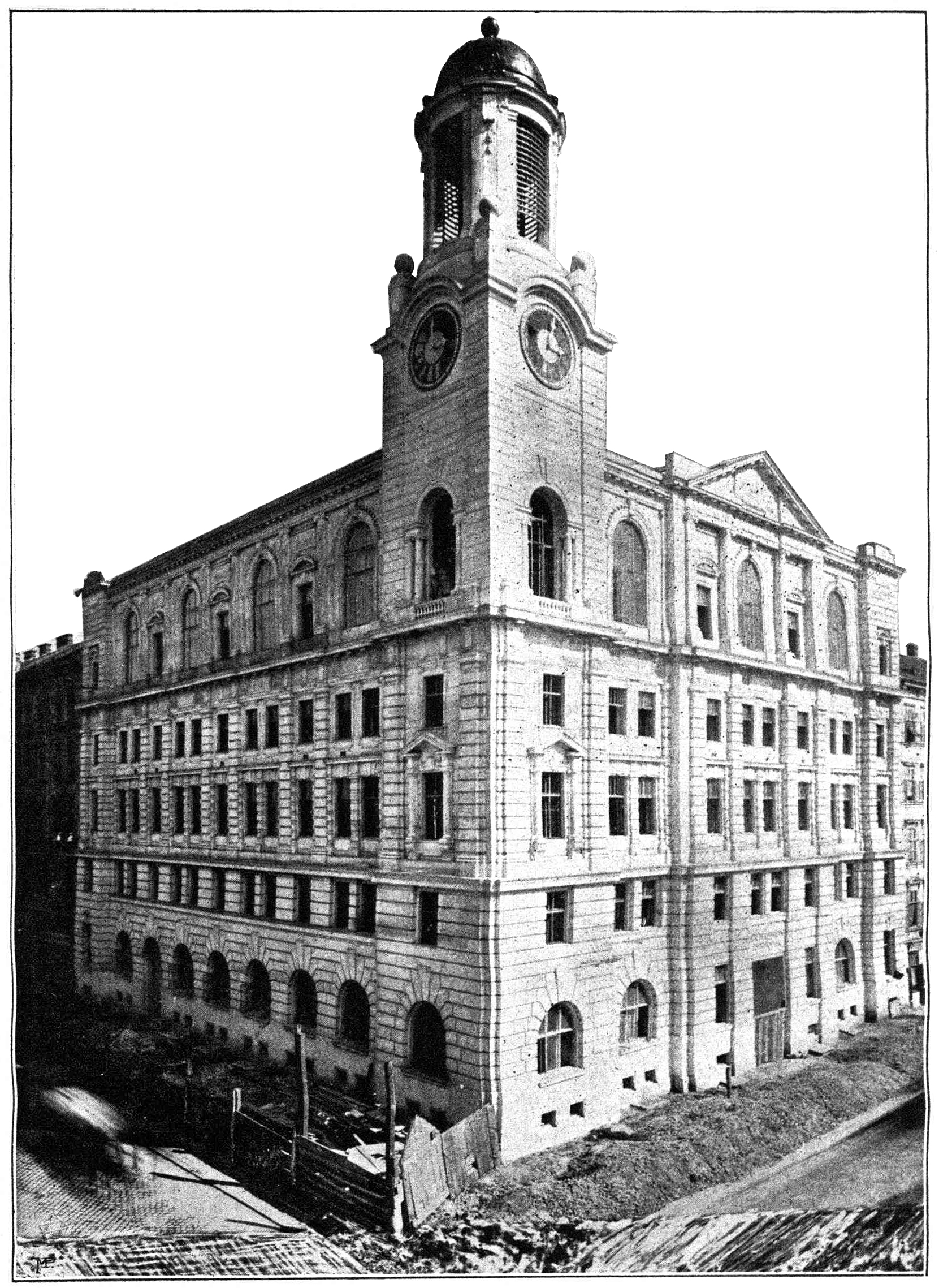 Wien-Alsergrund, Hahngasse 4/Berggasse 35, (neue) Telephon-Centralstation (erbaut 1898)